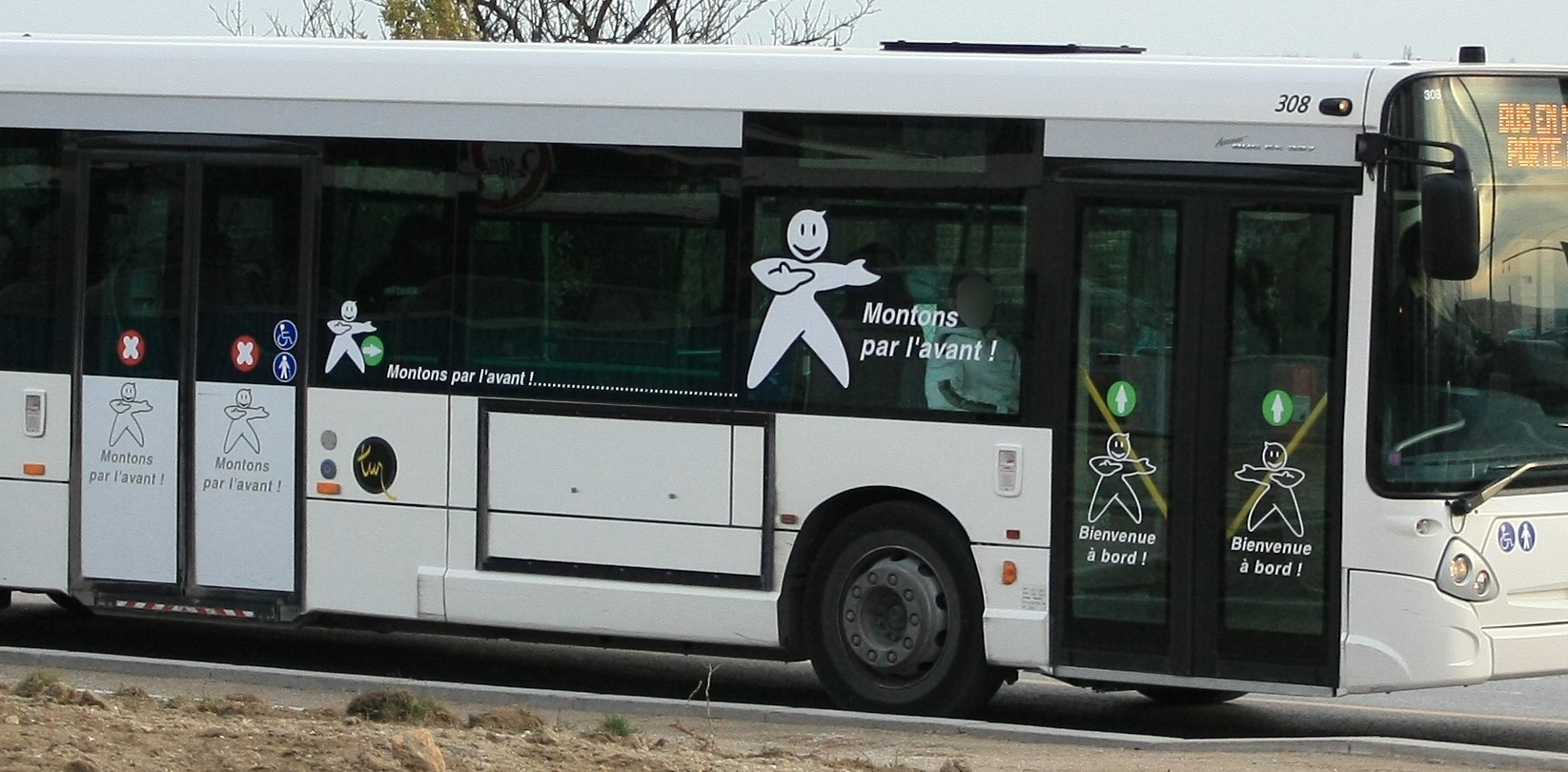 Signalétique Montée par l'Avant sur un GX 327 du réseau Citura en livrée transitoire